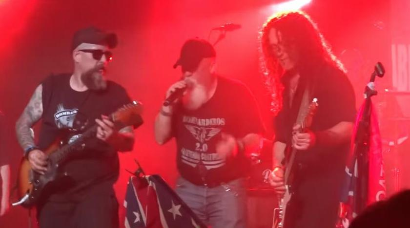 Banda de rock sureño Bombarderos en Razzmatazz 2 03/06/2016